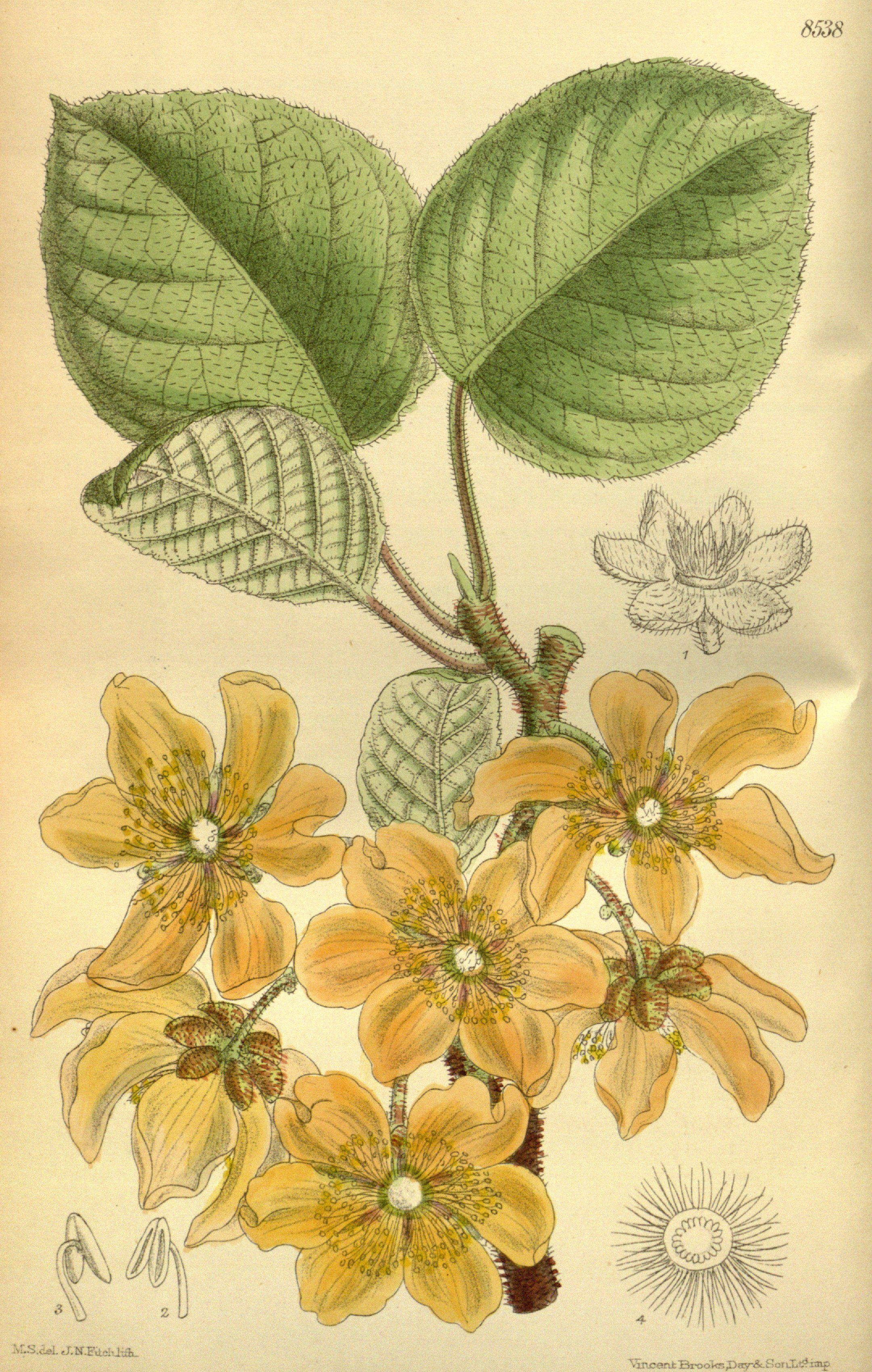 Actinidia chinensis, Actinidiaceae